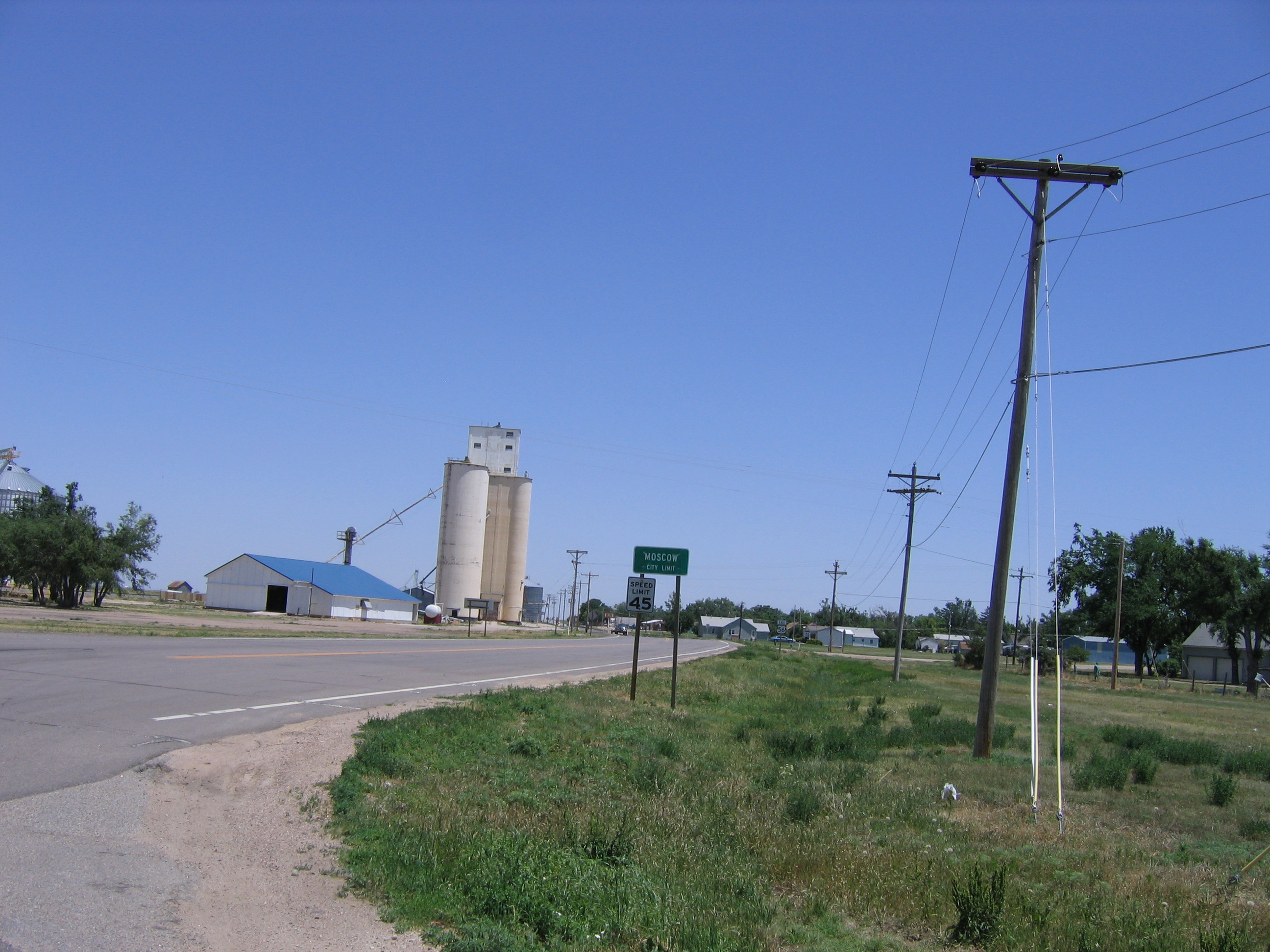 Moscow, Kansas